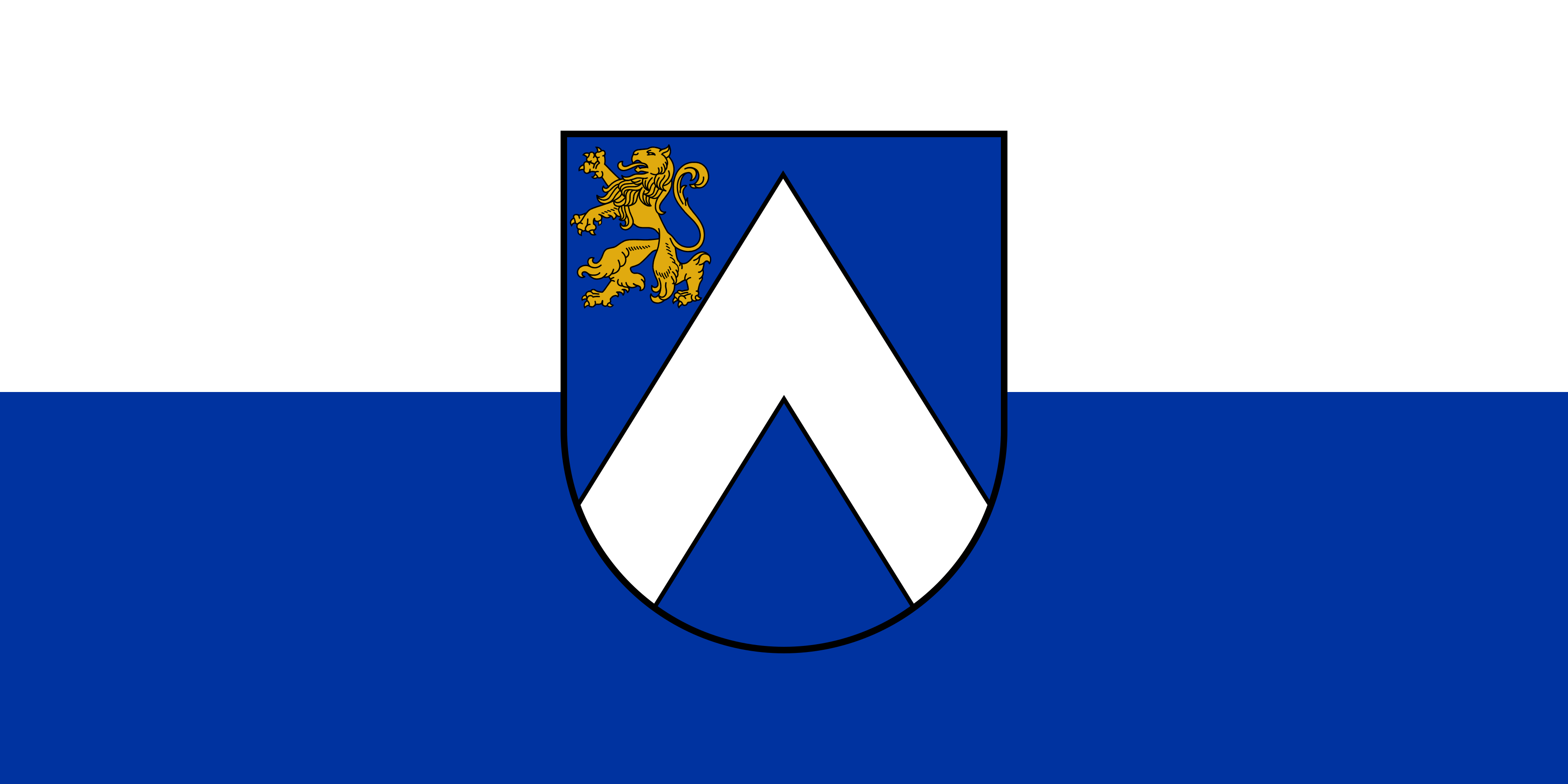 Bauskas novada karogs